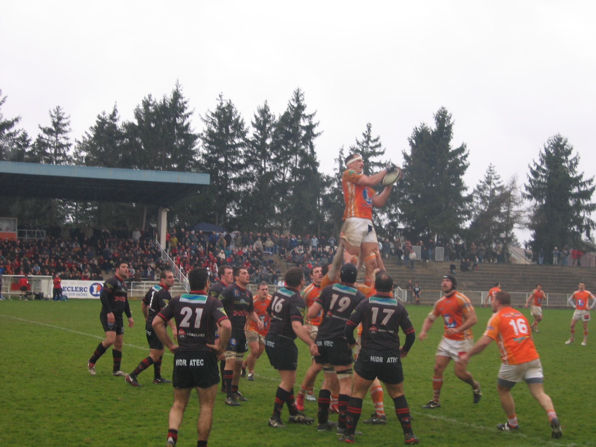 Rugby